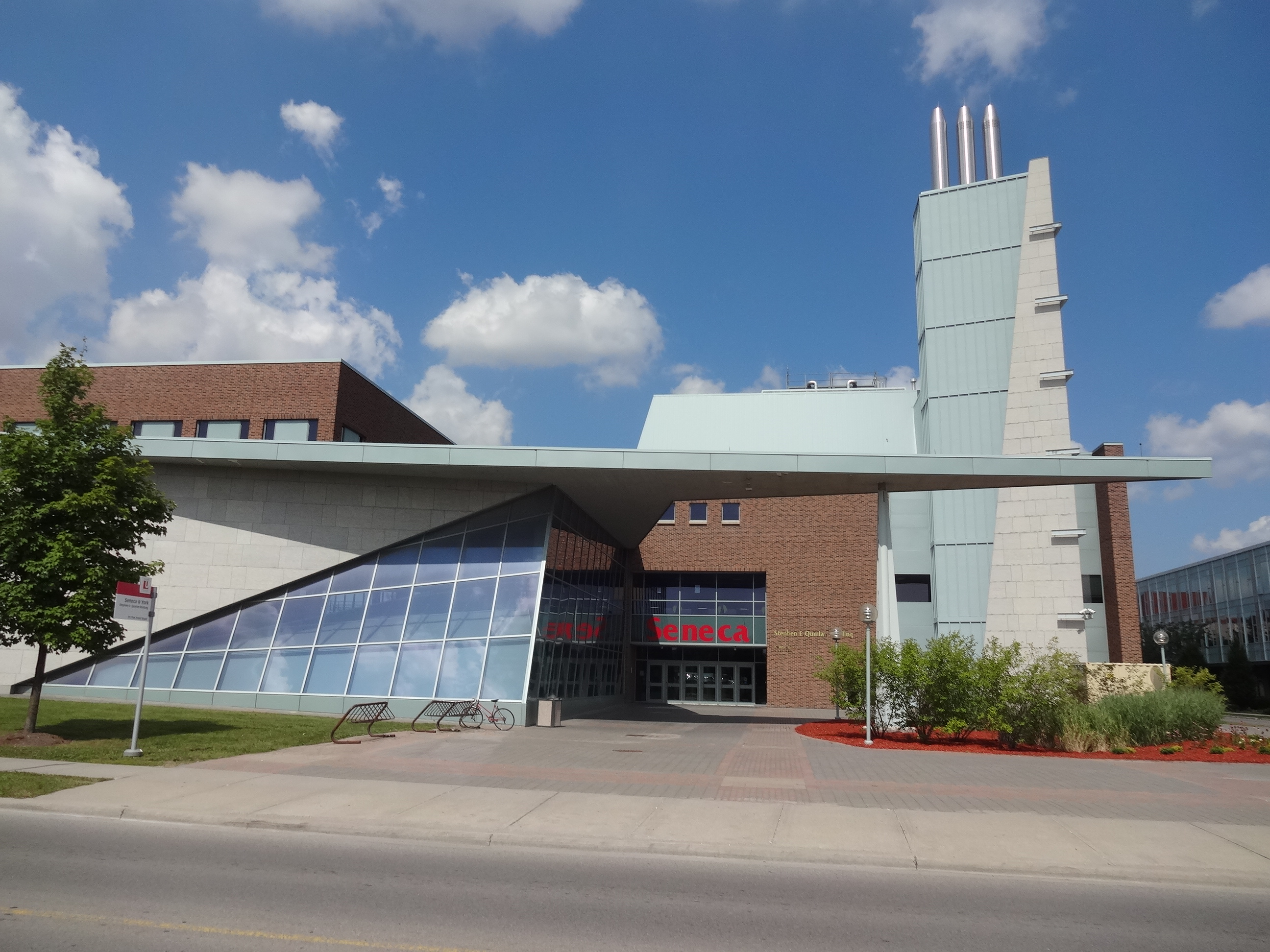 Seneca at York University.